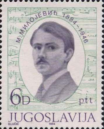 Miloje Milojević